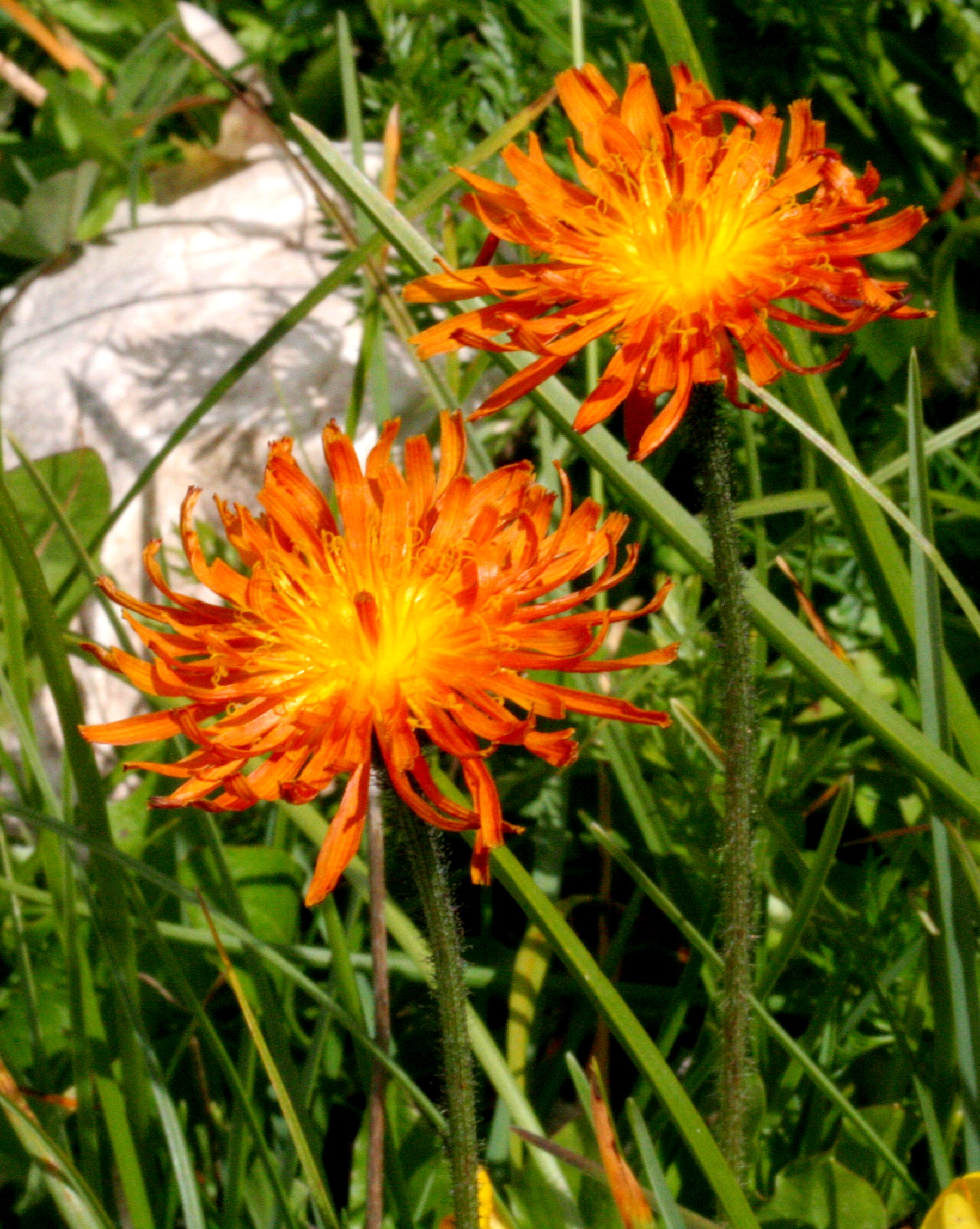 Crepis_aurea (Radichiella aranciata) Località : Passo di Falzarego, Cortina (BL), 2105 m s.l.m.